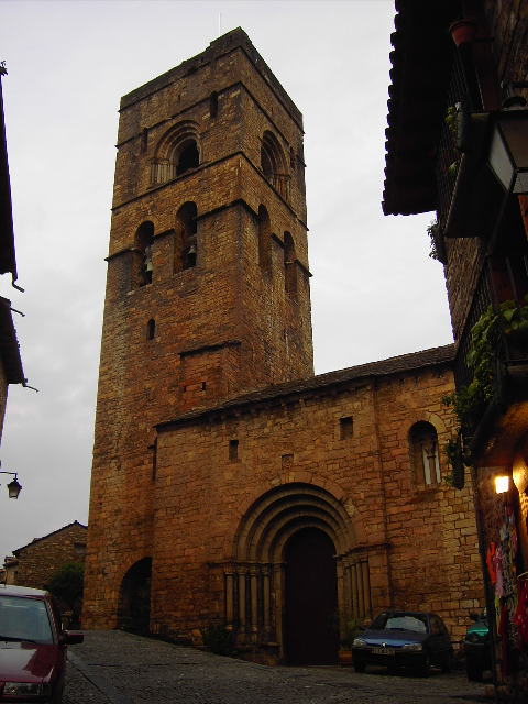 Iglesia-colegiata de Santa María de l'Aínsa, consagrada en 1181, en la capital de Sobrarbe.